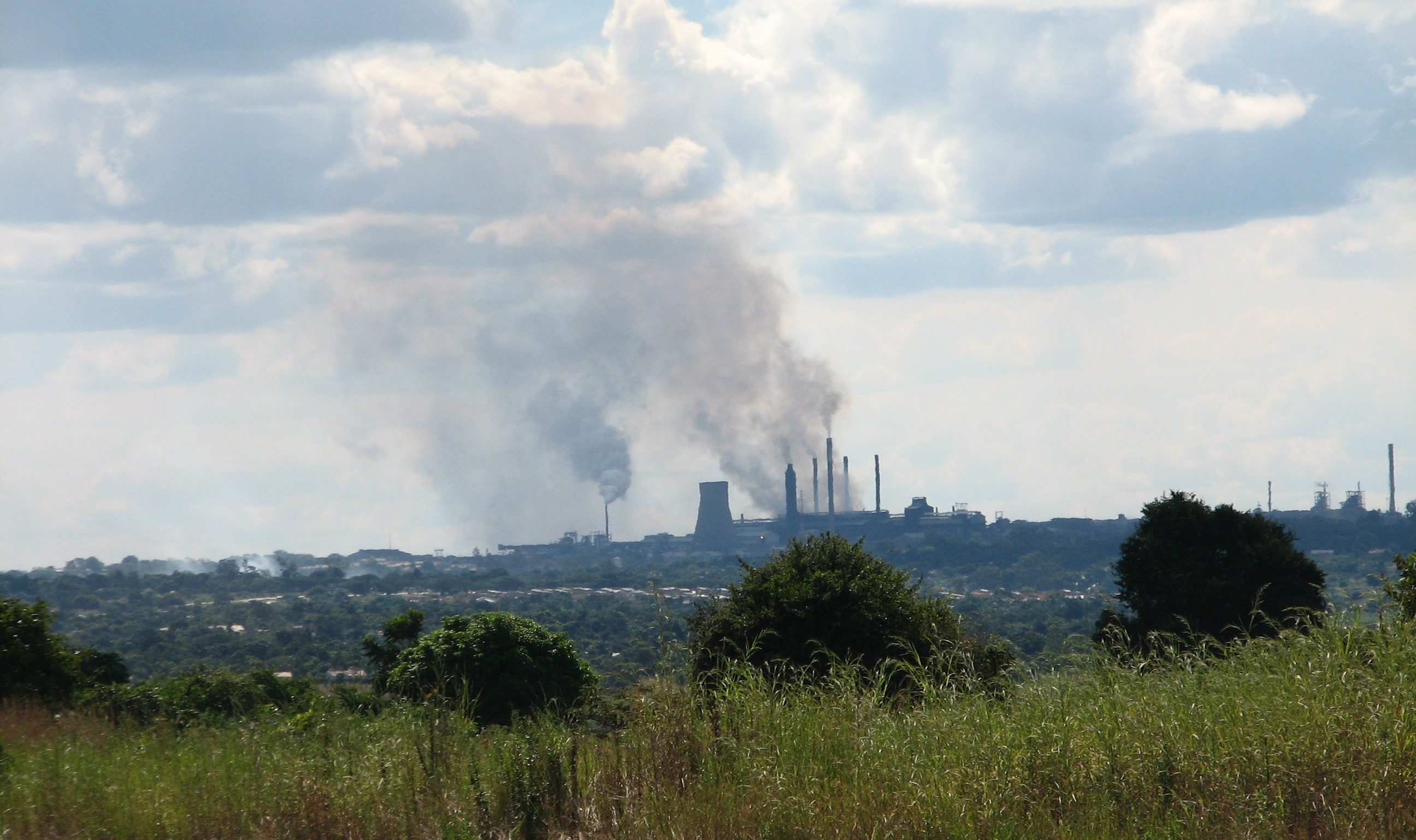 Kitwe,Zambia